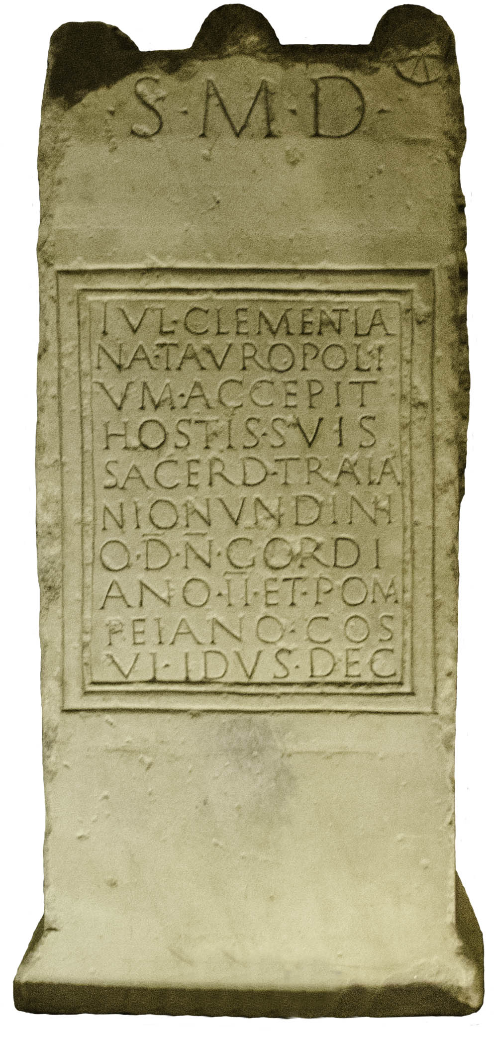 Autel taurobolique de Iulia Clementiana. Musée Eugène-Camoreyt de Lectoure, Gers, France.